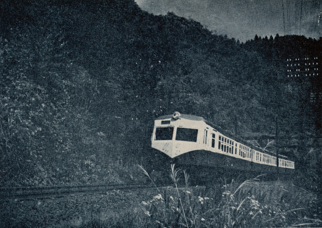 国鉄中央本線浅川 - 与瀬駅間を走行する70系電車。